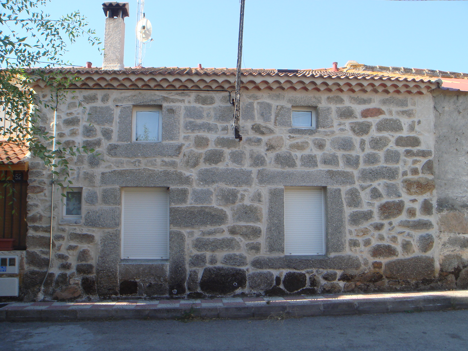 Arquitectura popular. Mampostería de granito, La Torre (Ávila), España.